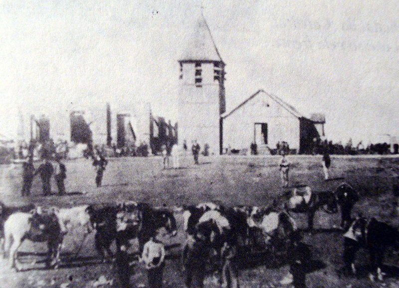 Primeira igreja matriz de Caxias do Sul